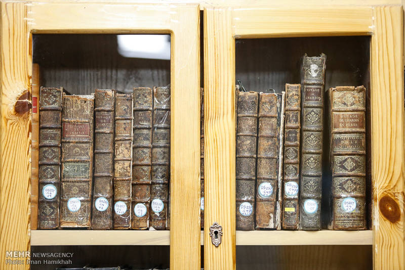 کتابخانه مرکزی و مرکز اسناد دانشگاه تهران